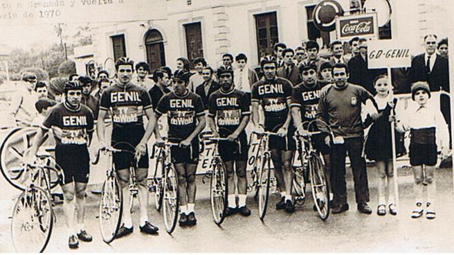 Formacion que disputó la Vuelta a Barcelona 1.970